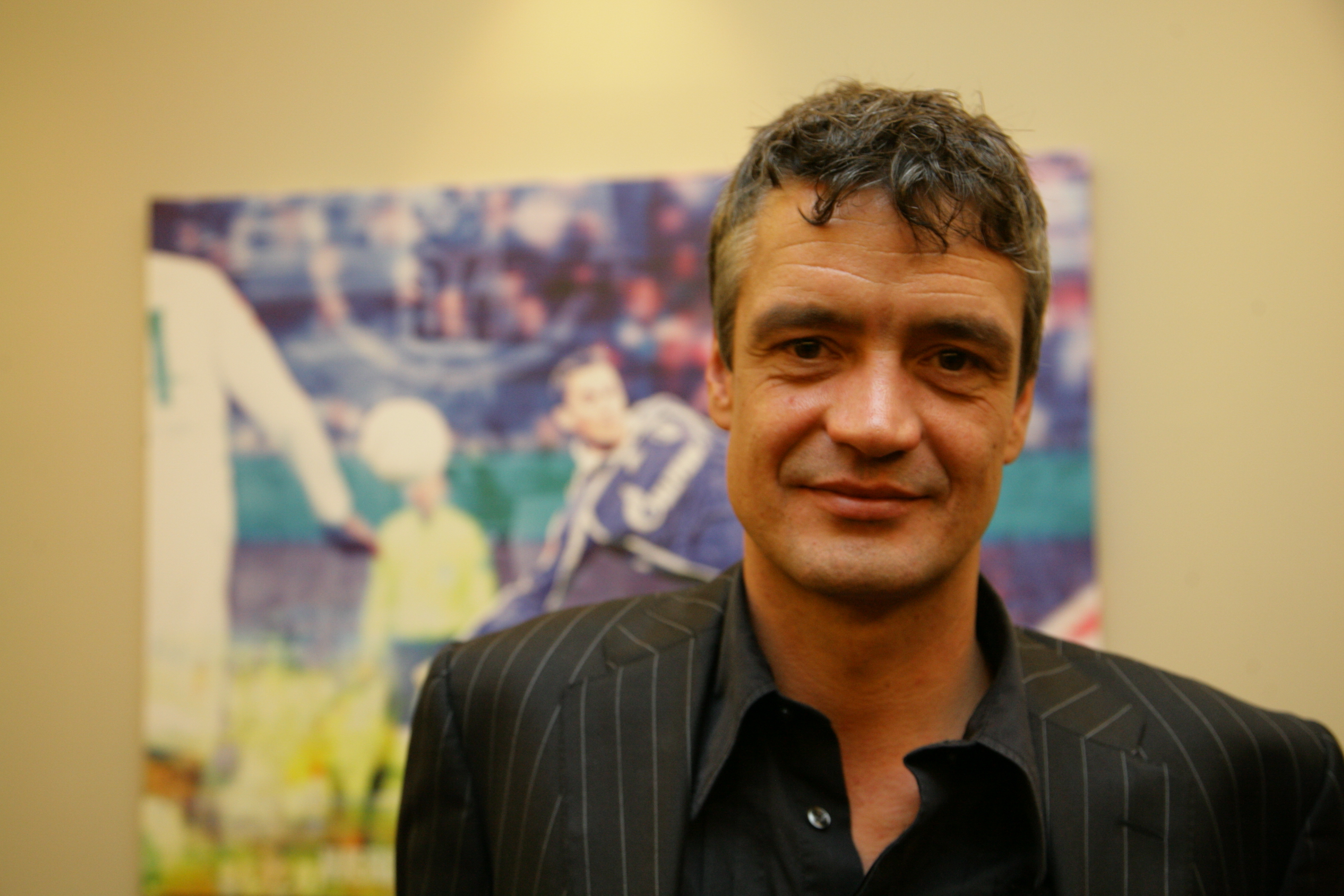 Der Sänger und Mitglied der "Prinzen" Jens Sembdner bei der Verleihung des Medienpreises "Goldener Kompass" am 11. November 2008 in der VELTINS-Arena in Gelsenkirchen